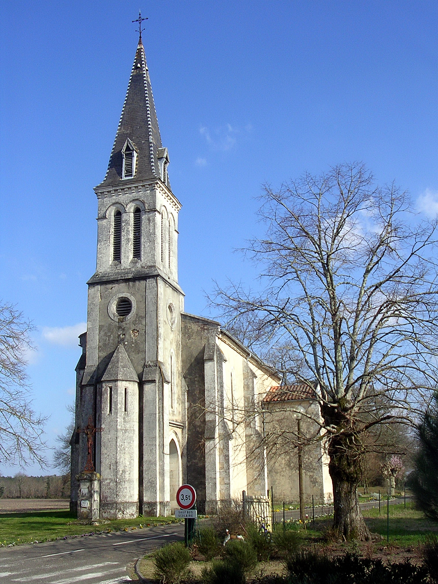 Eglise Saint-Pierre de Liposthey, dans le département français des Landes